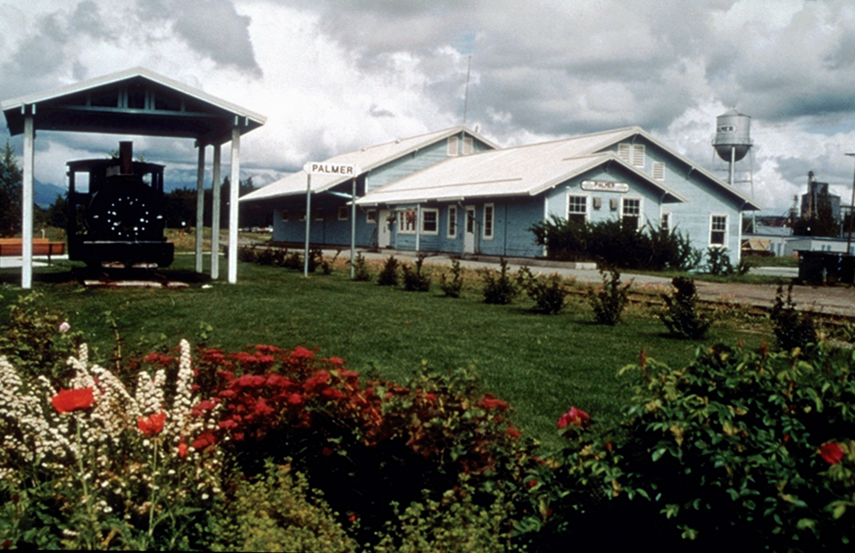 Train depot in Palmer, Alaska, US.